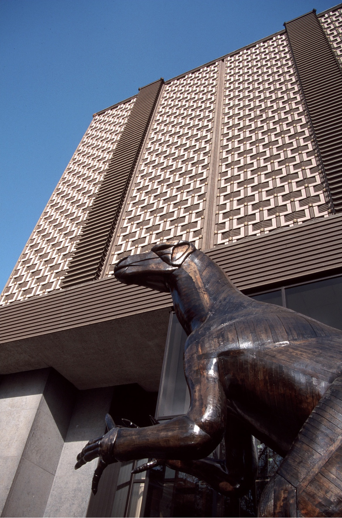 buitenkant Koninklijk Museum voor Natuurwetenschappen, met toestemming